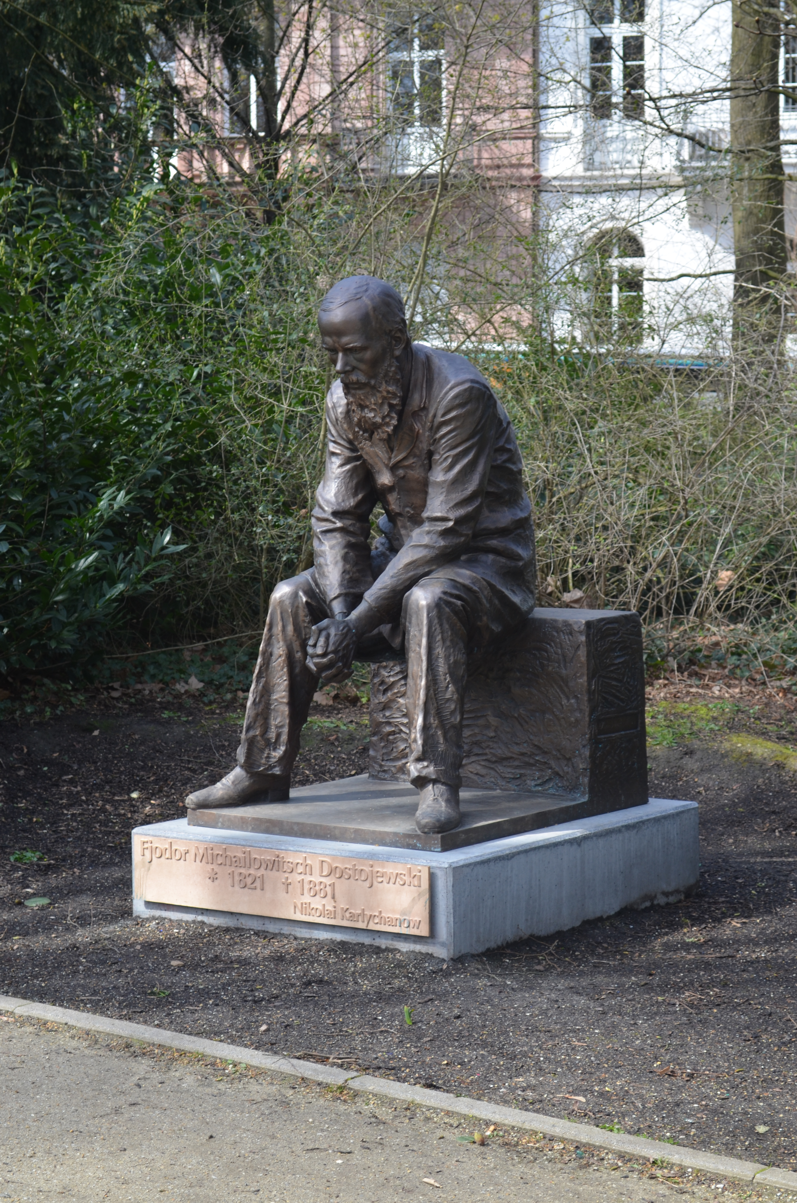 Bad Homburg, Denkmal Dostojewski. Das Denkmal wurde 2014 durch den russischen Künstler Nikolai Karlychanow geschaffen. Der Preis der Skulptur betrug 35.000 €.